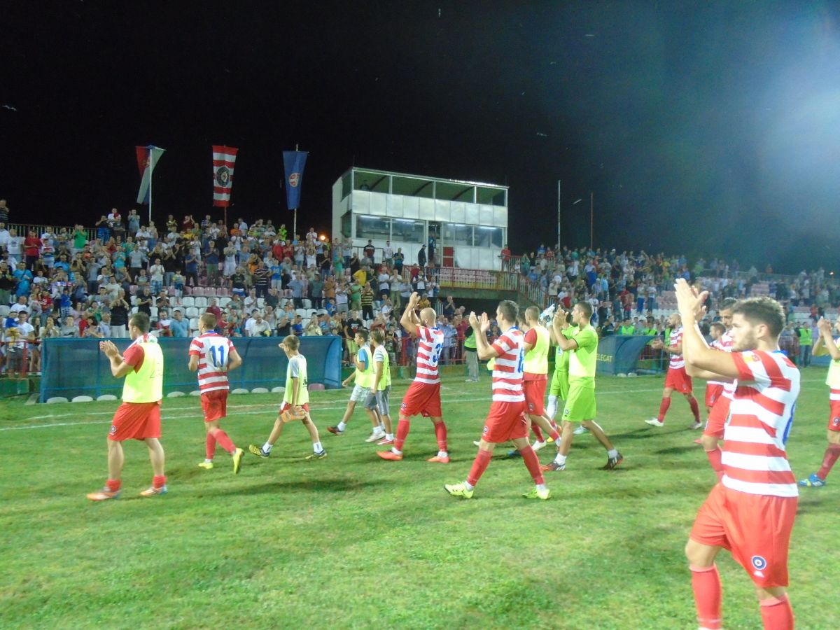 Након утакмице Борац Чачак – Раднички Ниш. После преокрета, Борац је сезону започео победом резултатом 2-1.